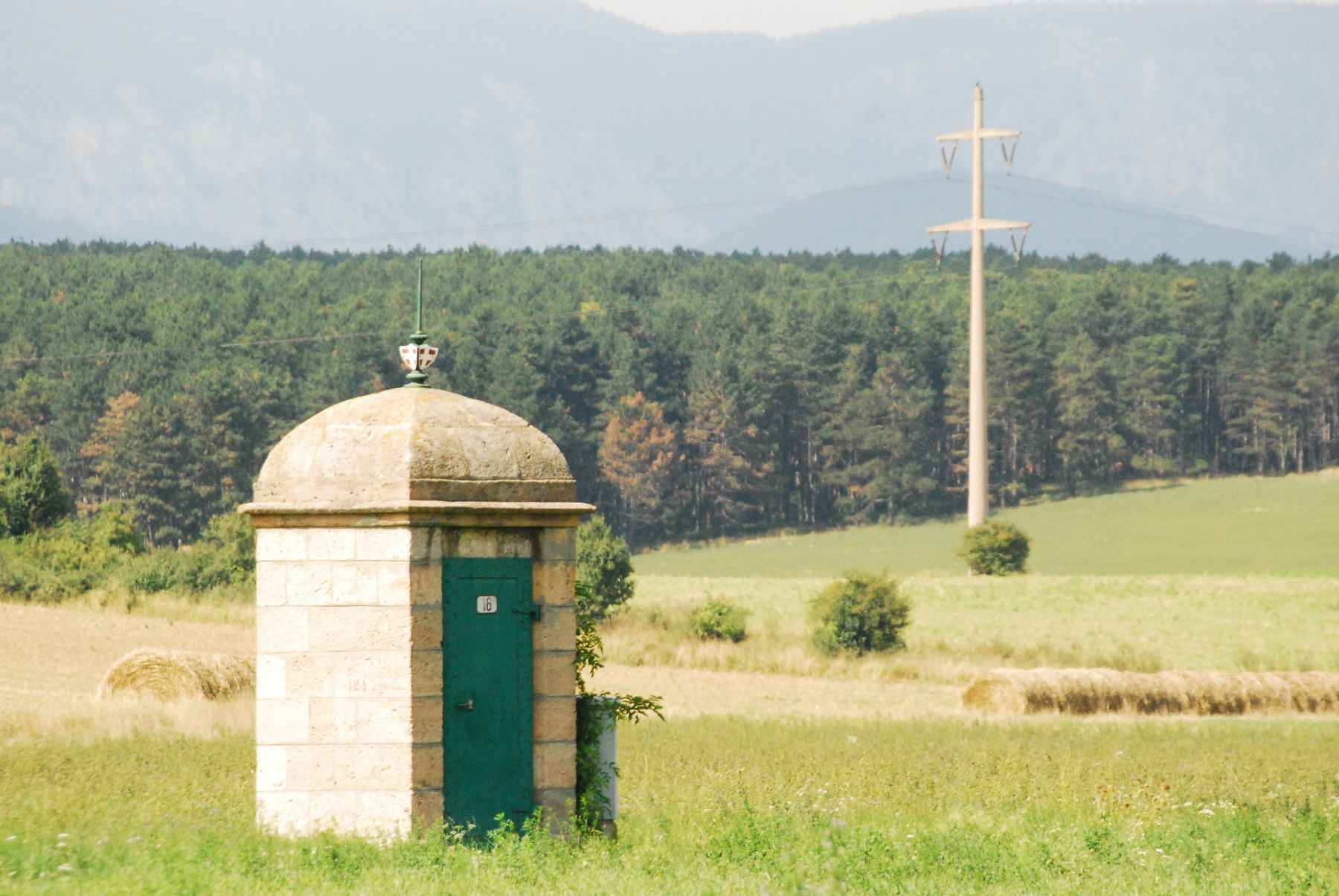 Einstiegshäuschen Nummer 16 der Ersten Wiener Hochquellenwasserleitung bei Neunkirchen